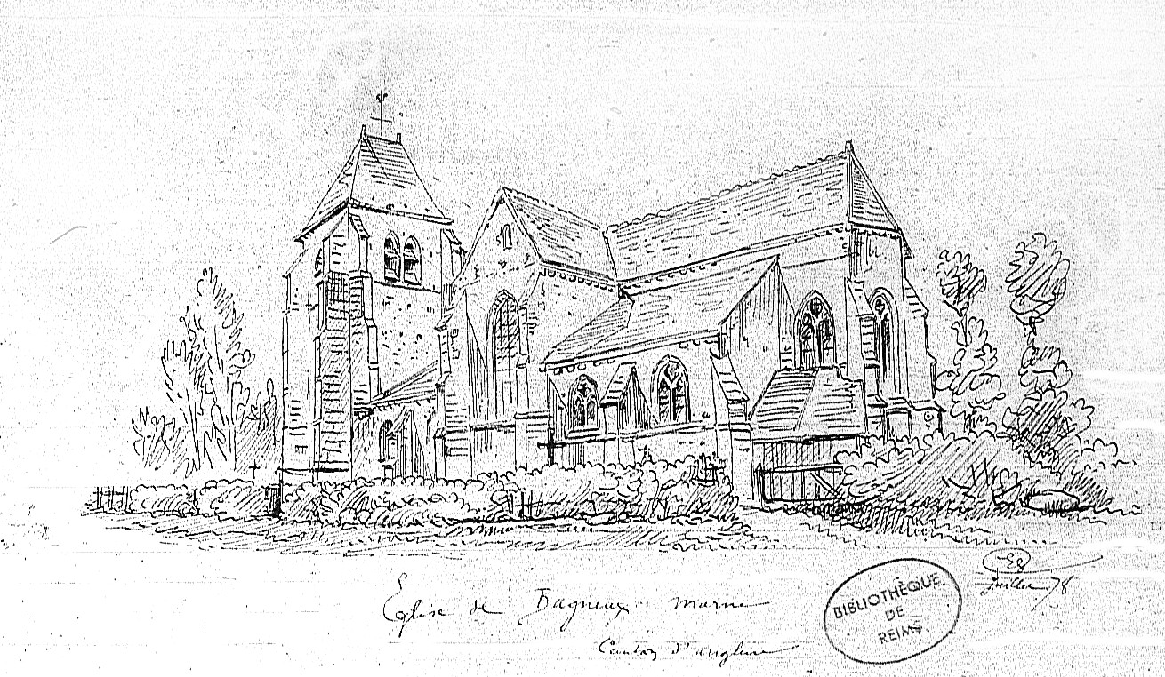 issu du fonds iconographique de la bibliothèque.